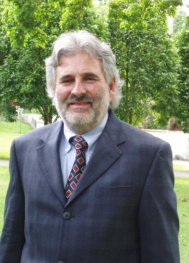 Benjamín Rubén Scharifker Podolsky, rector de la Unimet, ex rector USB